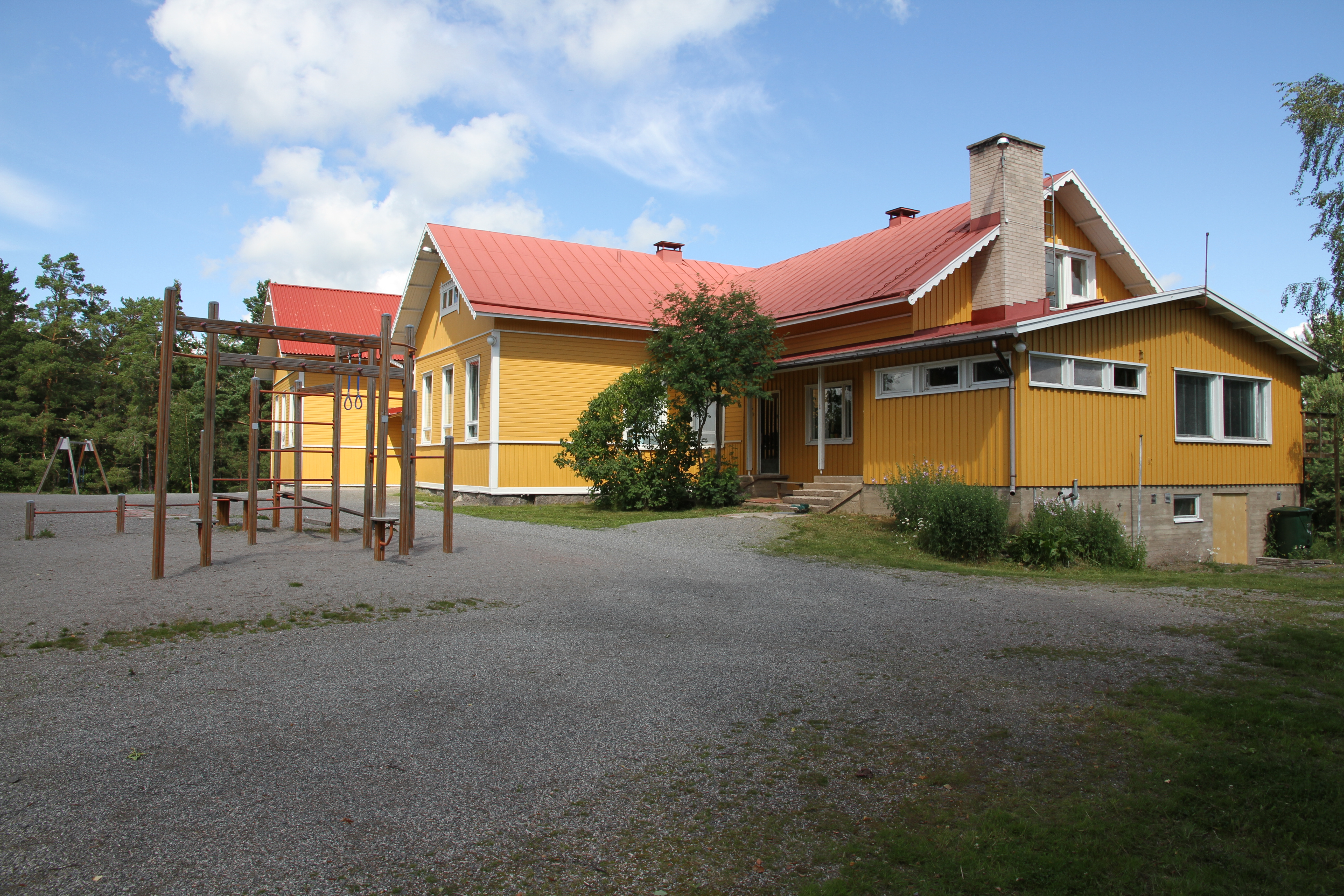 Velkuan koulu, Palva, Velkua, Naantali